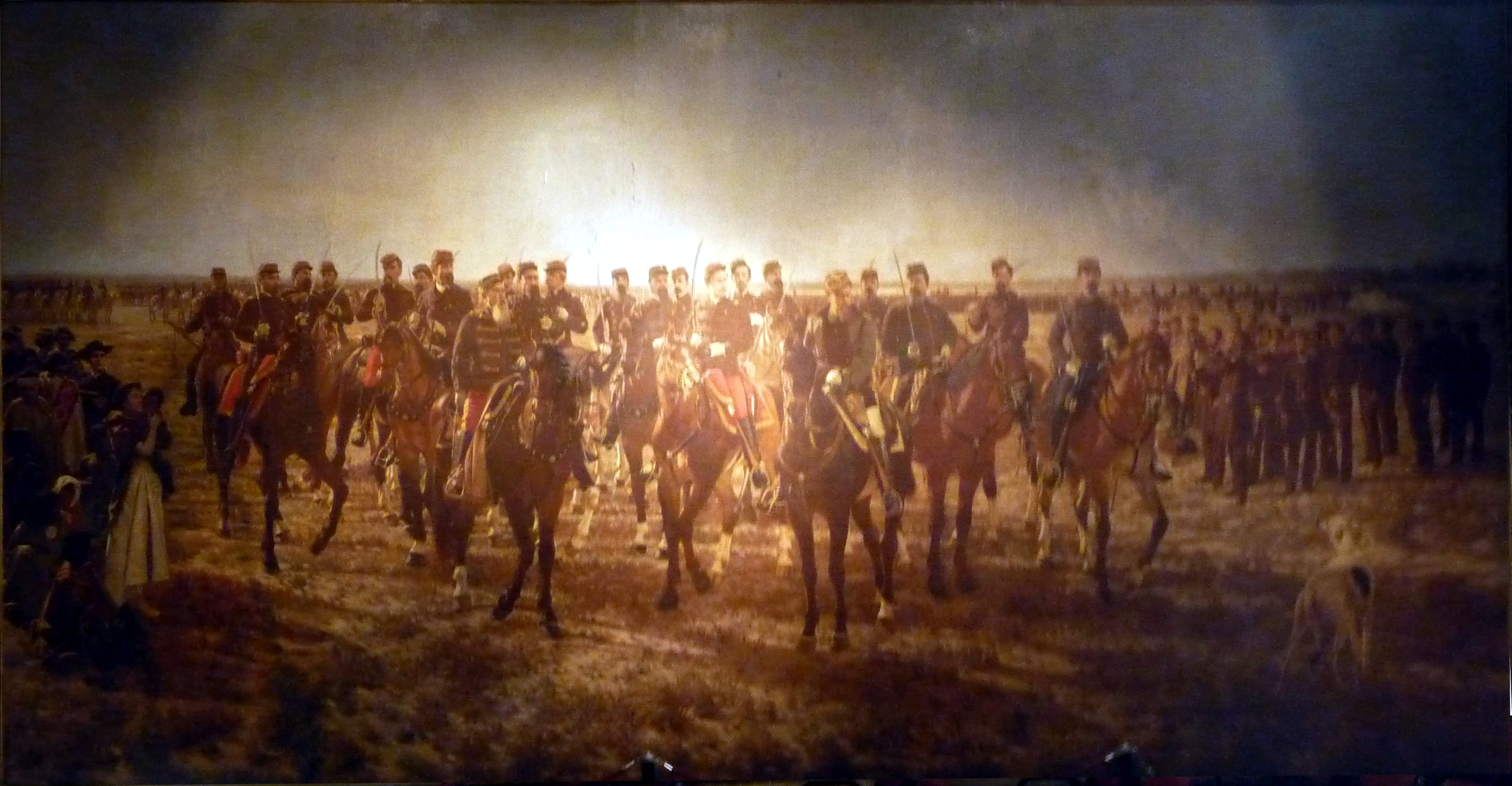 Autor: Juan Manuel Blanes "Ocupación militar del Río Negro en la expedición al mando del General Julio A. Roca", 1879 Óleo sobre tela Buenos Aires, 1889 (f.4375)